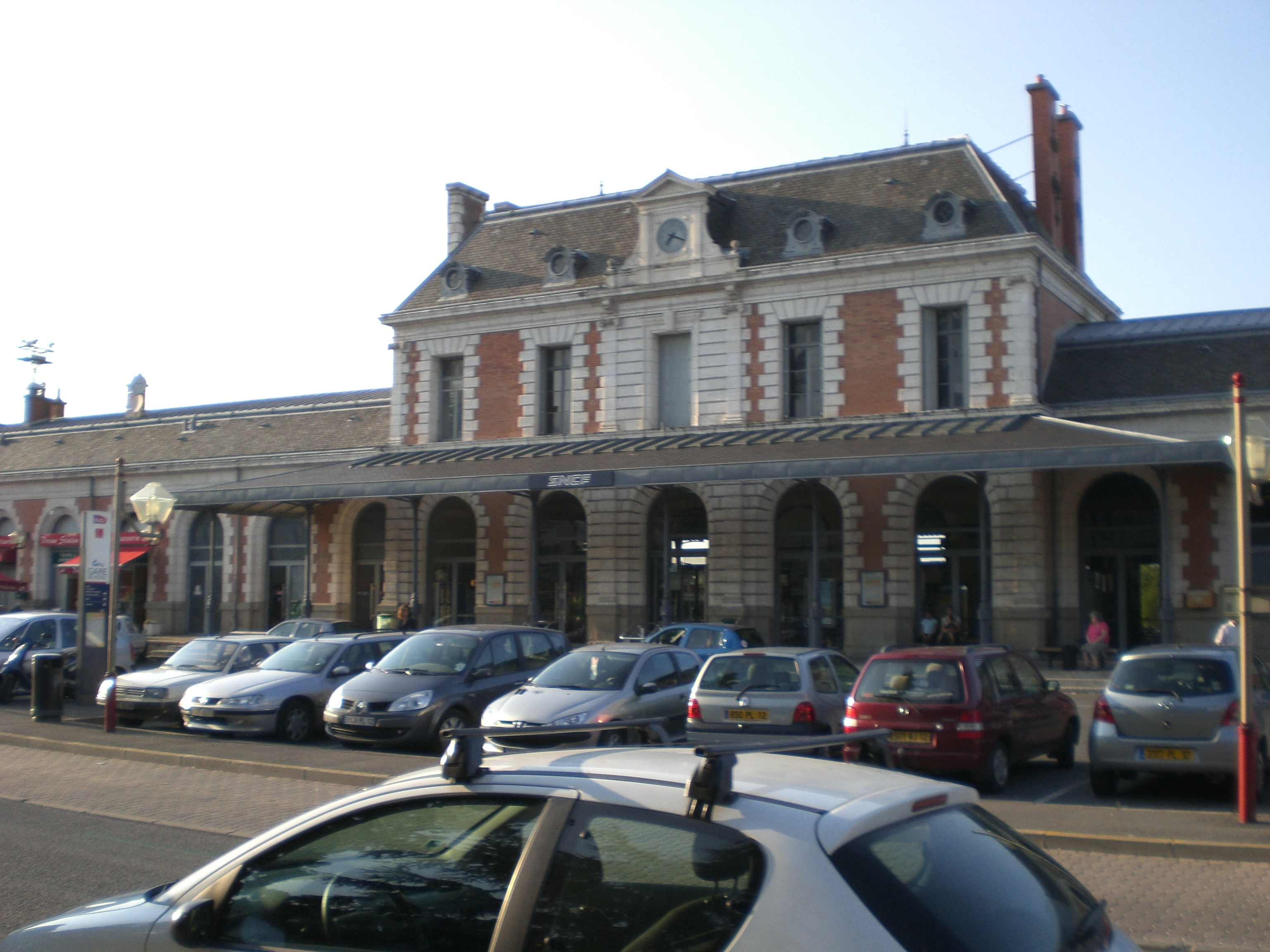 Gare SNCF de Rodez (Aveyron, France).